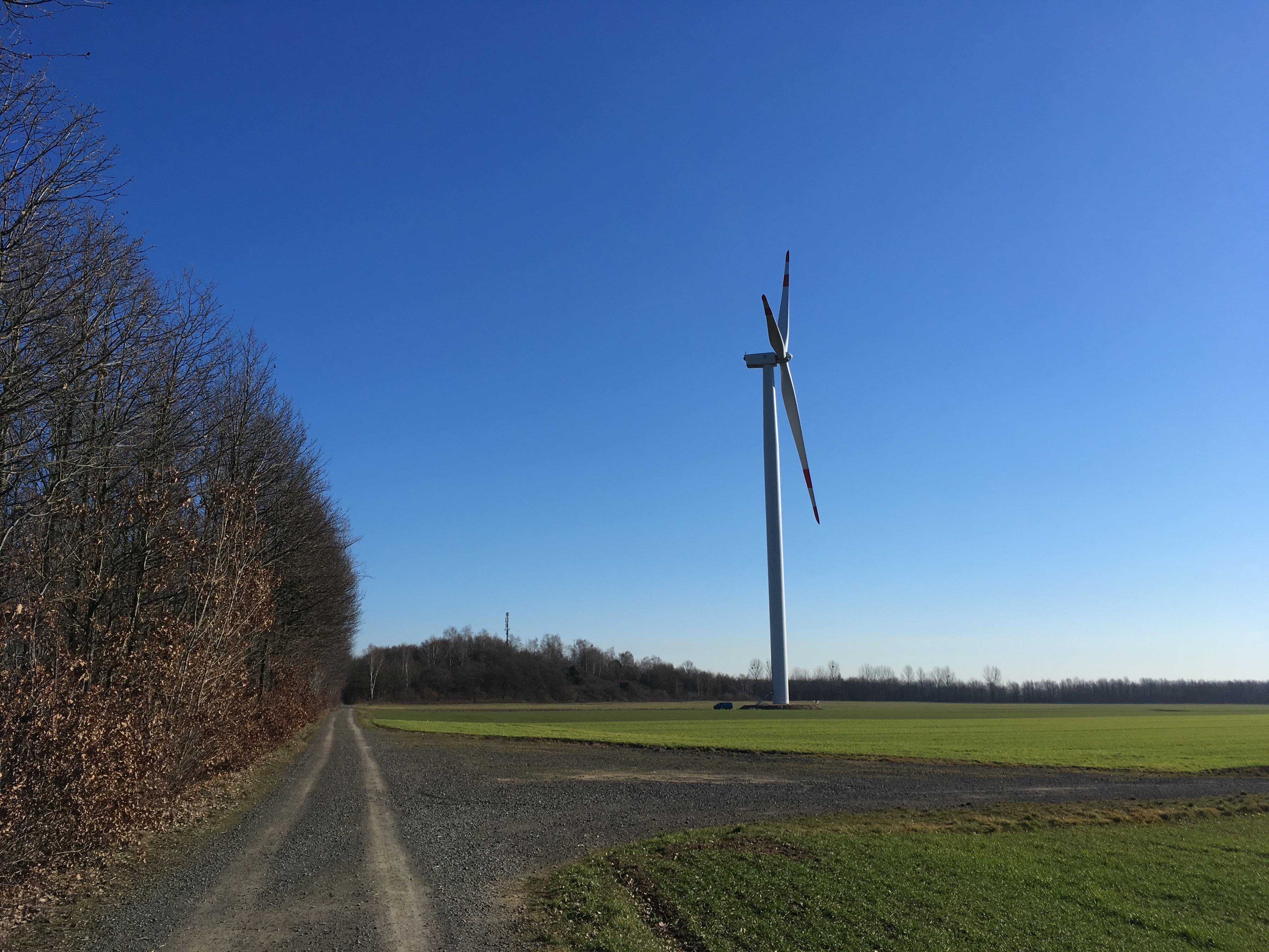 Die Berrenrather Börde ist eine Kulturlandschaft, die durch einen Braunkohle-Tagebau entstand. Sie liegt in Hürth, einer Stadt im Rhein-Erft-Kreis im Land NRW.